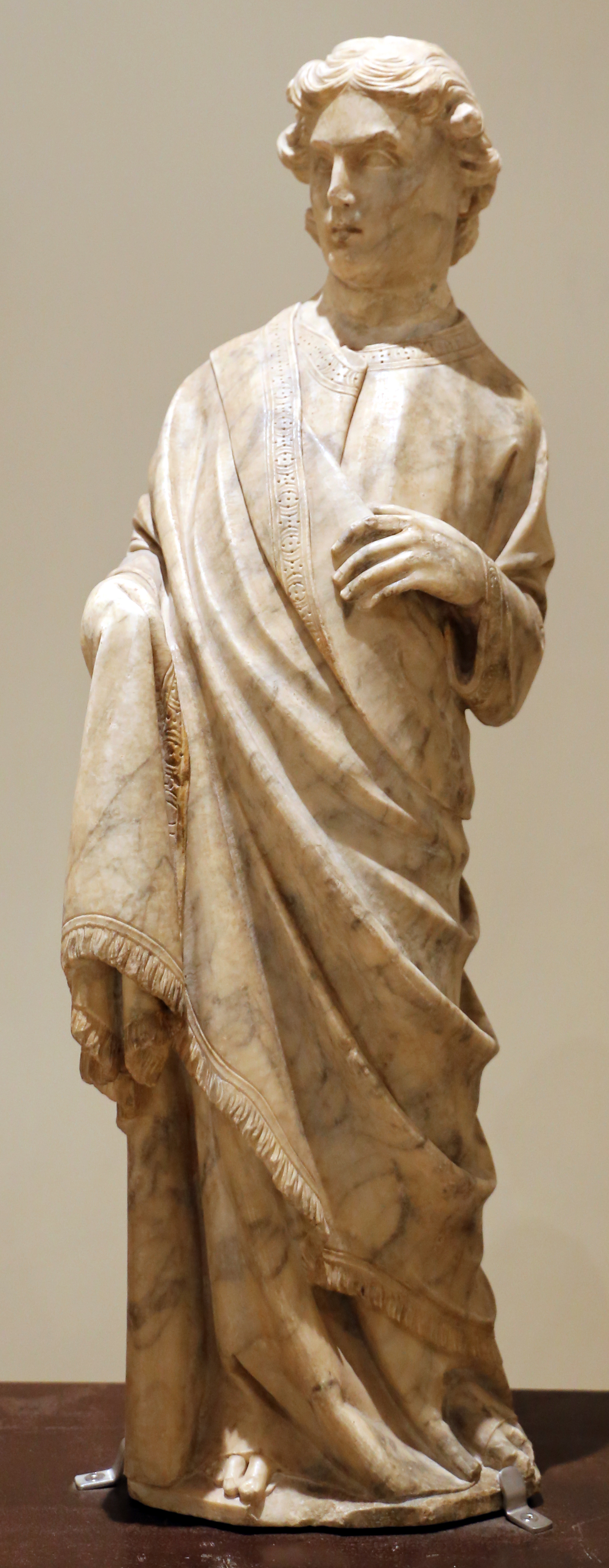 Museo di Arte Sacra (Massa Marittima) This is a photo of a monument which is part of cultural heritage of Italy.